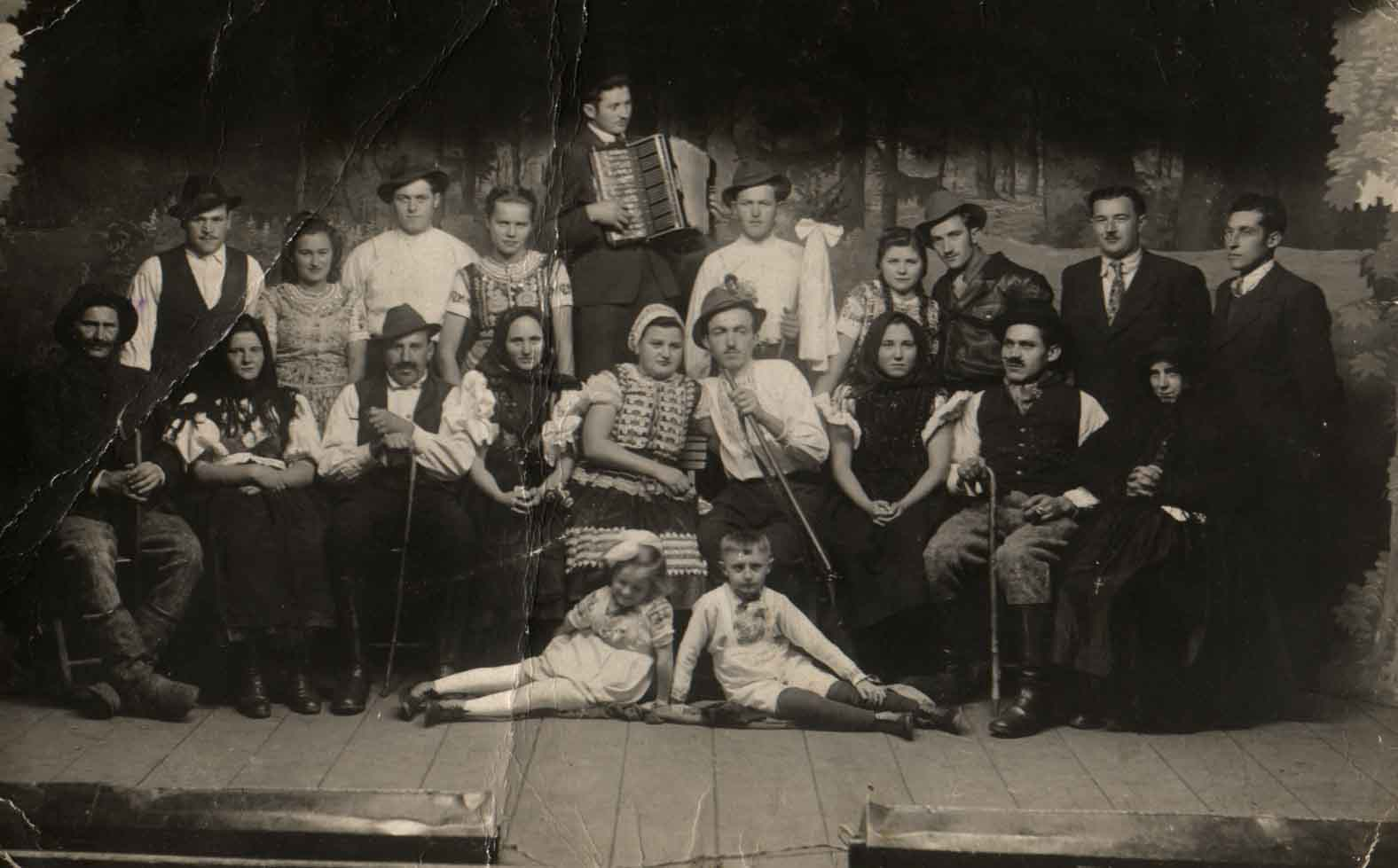 Divadelny subor HO